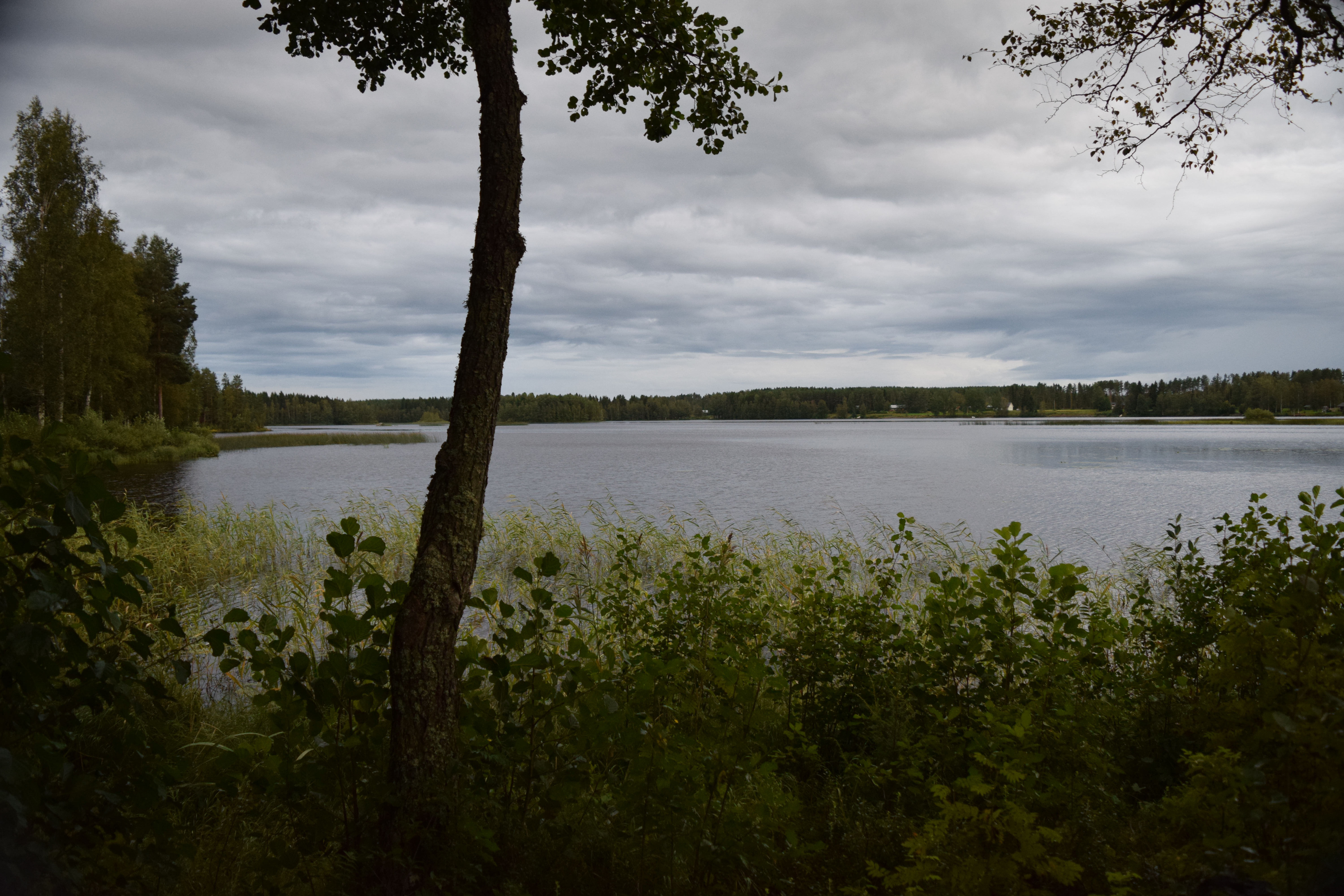 Sjö bild